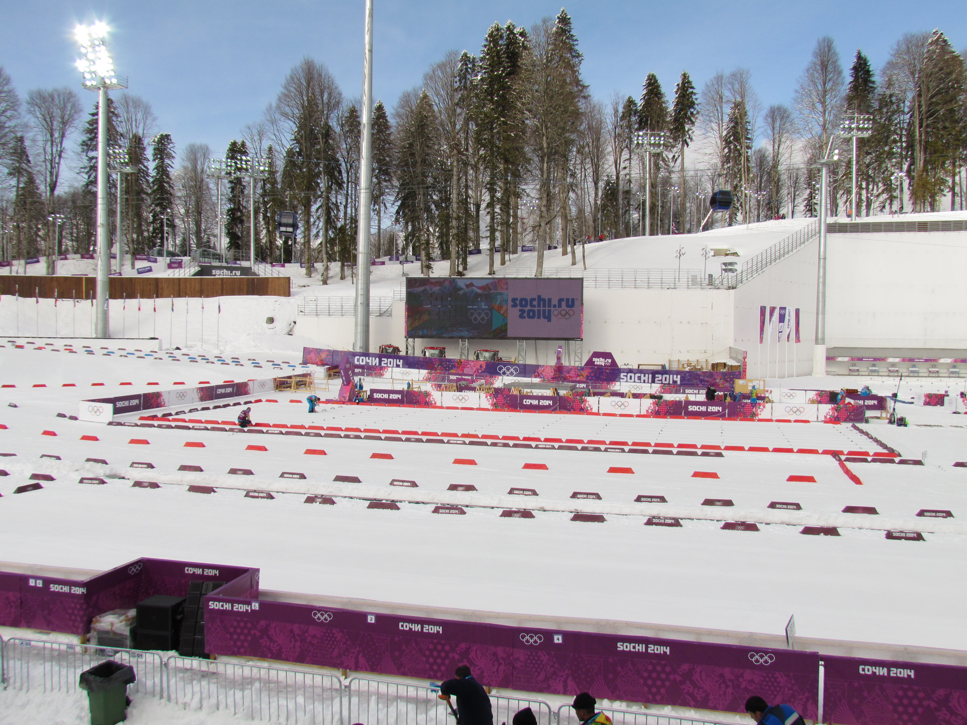 Лижно-біатлонний комплекс «Лаура» (смт Красна Поляна, Сочі, Краснодарський край) під час Олімпійських ігор